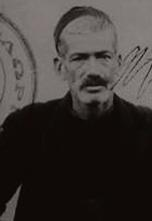 Теодорос Мораитис